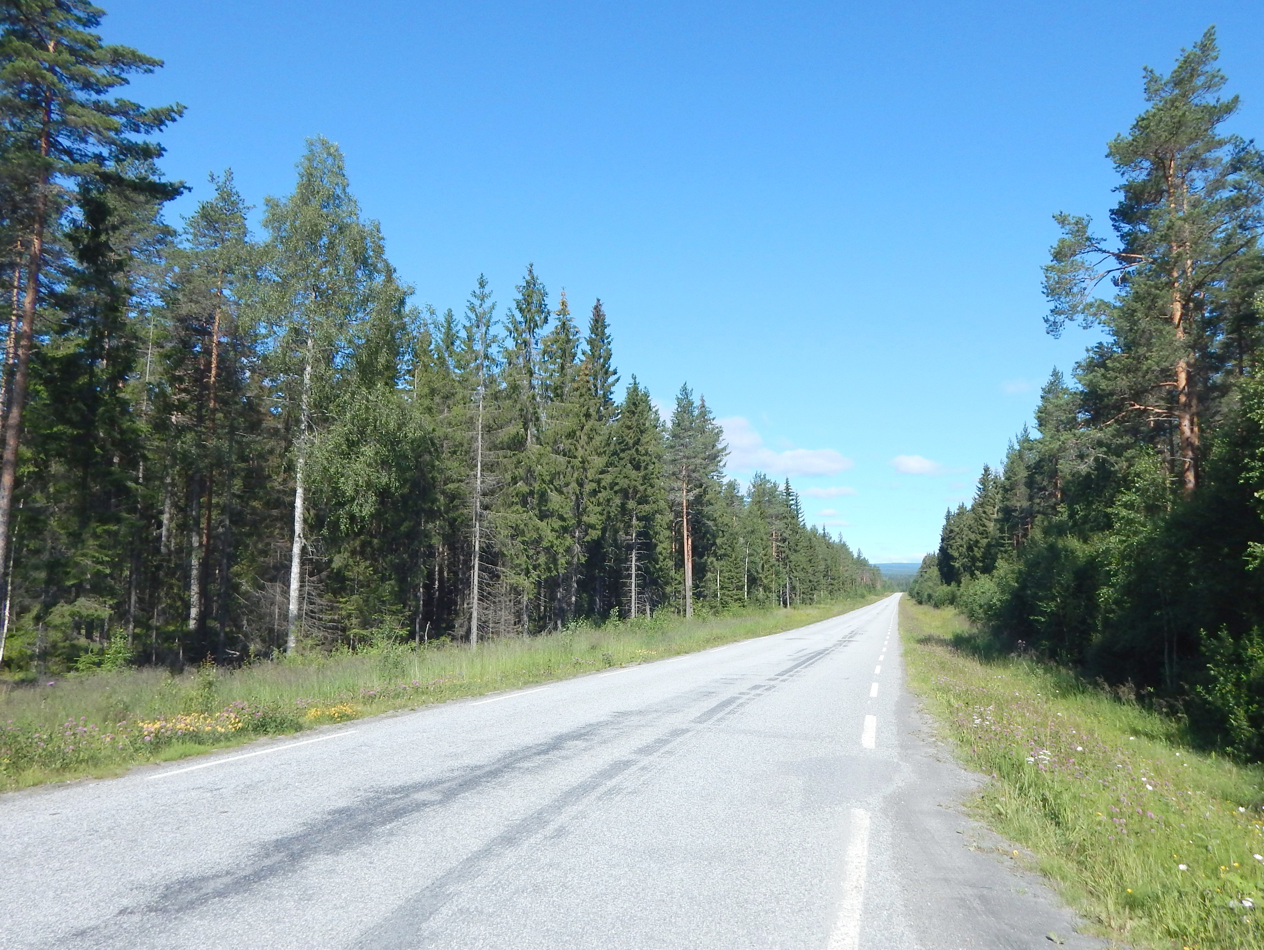 Nordbygdvegen (fylkesvei 1808, tidl. 115)